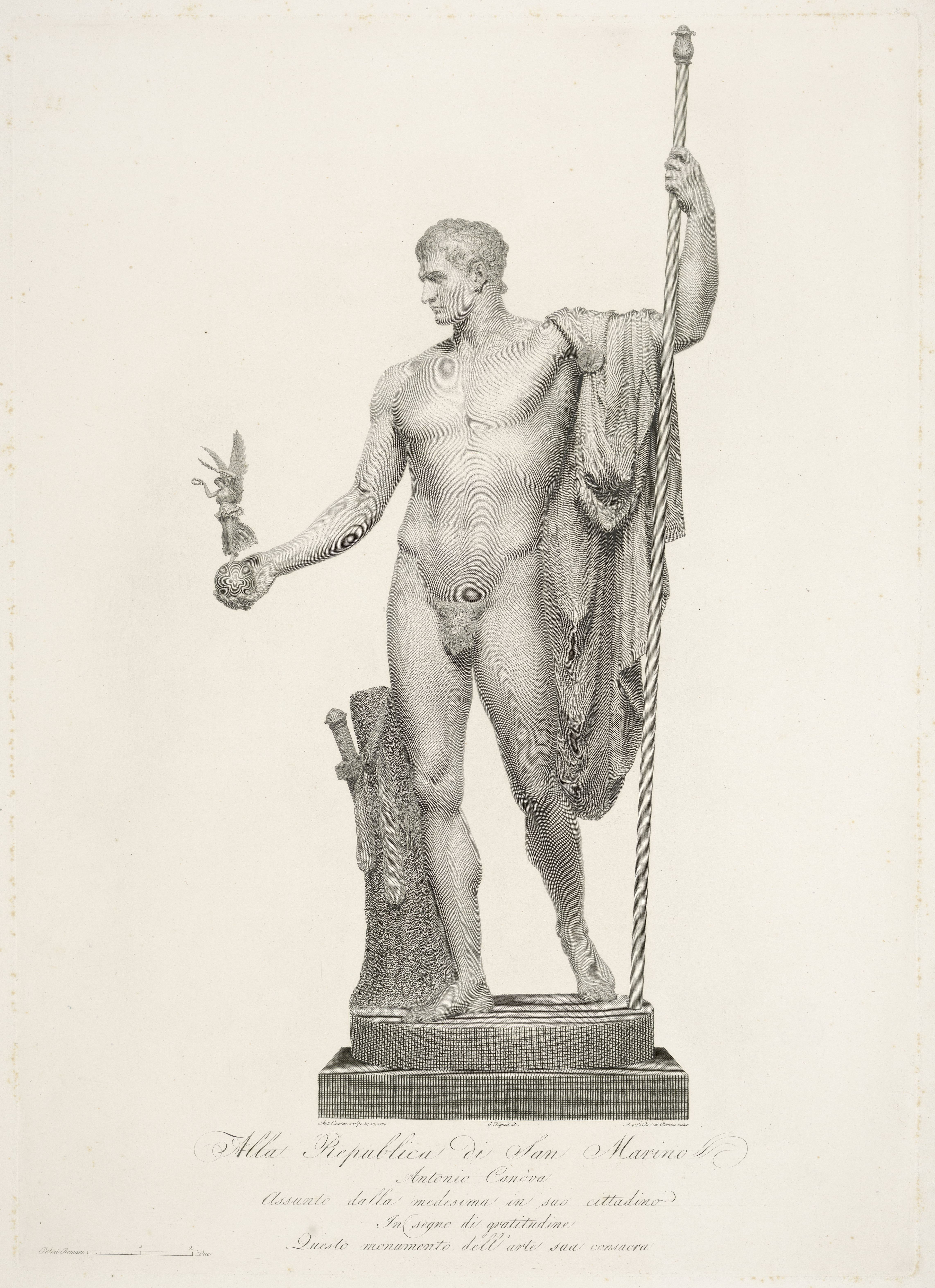 IdentificatieTitel(s): Napoleon als vredestichtende MarsSculpturen van Antonio Canova (serietitel)Objecttype: prent Objectnummer: RP-P-OB-39.165Catalogusreferentie: LeBlanc 17Opschriften / Merken: verzamelaarsmerk, verso, gestempeld: Lugt 12Omschrijving: Sculptuur van Napoleon I Bonaparte als de vredestichtende god Mars door de Italiaans beeldhouwer Antonio Canova.VervaardigingVervaardiger: prentmaker: Antonio Ricciani (vermeld op object)naar tekening van: Giovanni Tognolli (vermeld op object)naar beeld van: Antonio Canova (vermeld op object)Plaats vervaardiging: ItaliëDatering: 1785 - 1836Fysieke kenmerken: gravureMateriaal: papier Techniek: graveren (drukprocedé)Afmetingen: plaatrand: h 645 mm × b 465 mmToelichtingDeze prent maakt deel uit van een reeks van onbekende omvang met voorstellingen van sculpturen van Antonio Canova door verschillende prentmakers naar tekeningen van Giovanni Tognolli.OnderwerpWat: piece of sculpture, reproduction of a piece of sculpture(story of) Mars (Ares)ruler, sovereignWie: Napoleon I BonaparteVerwerving en rechtenVerwerving: onbekend 2006Copyright: Publiek domein